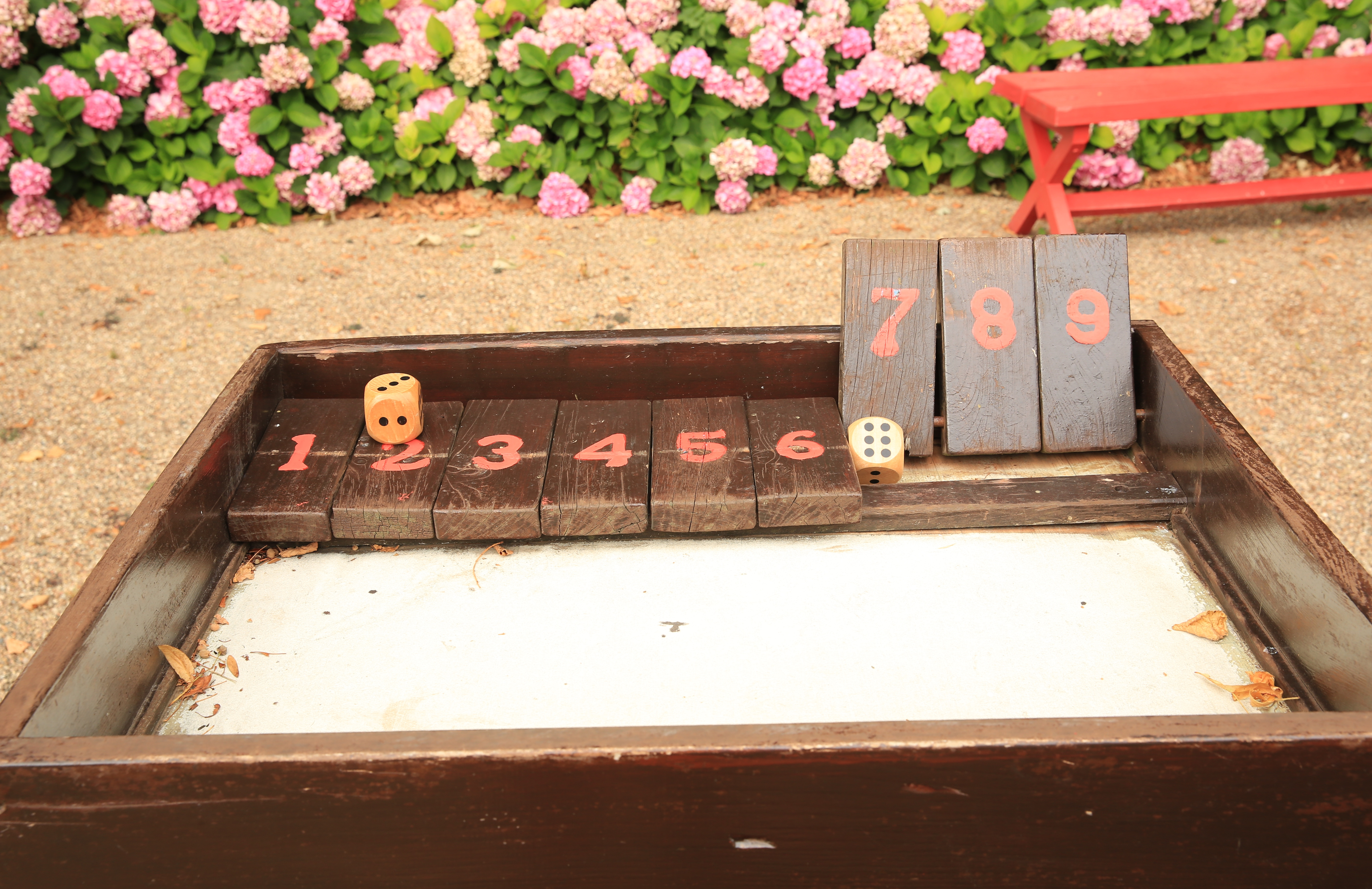 Shut the box. Jeu en bois à l'entrée du Domaine de Chanteloup. Il faut fermer un maximum de battants numérotés correspondant au montant de deux dés jetés.